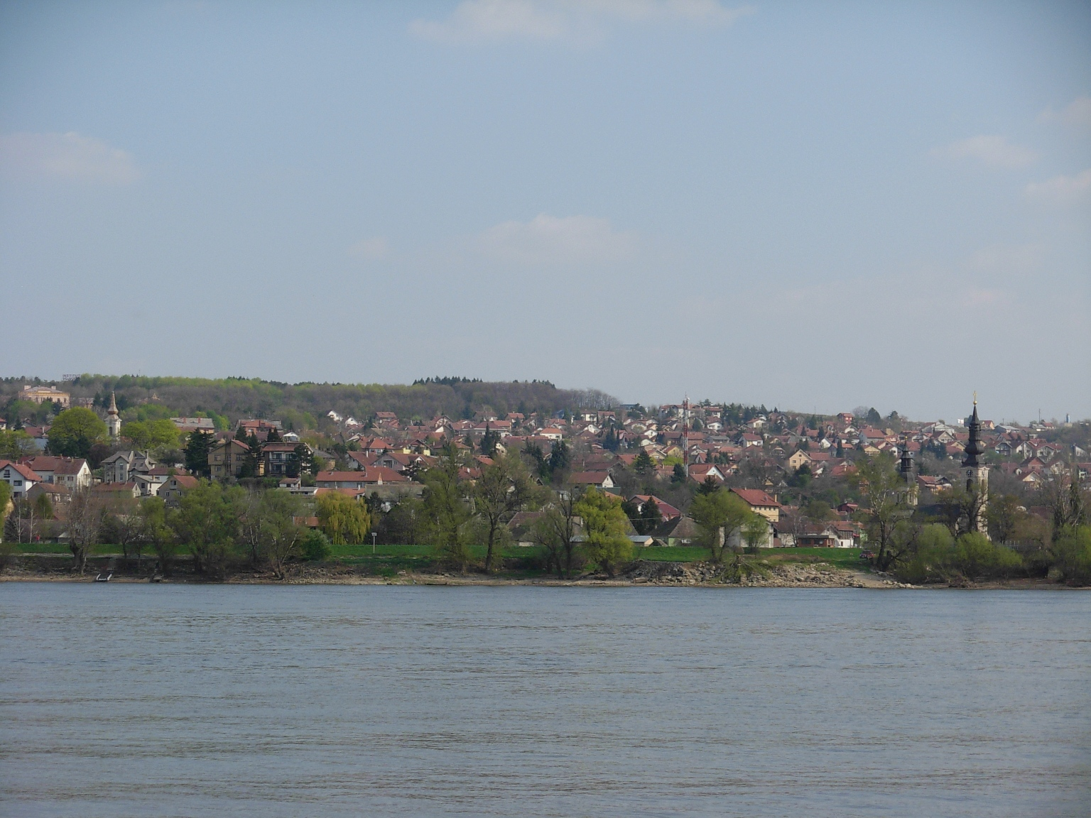 Pogled na Sremsku Kamenicu sa Šodroša.